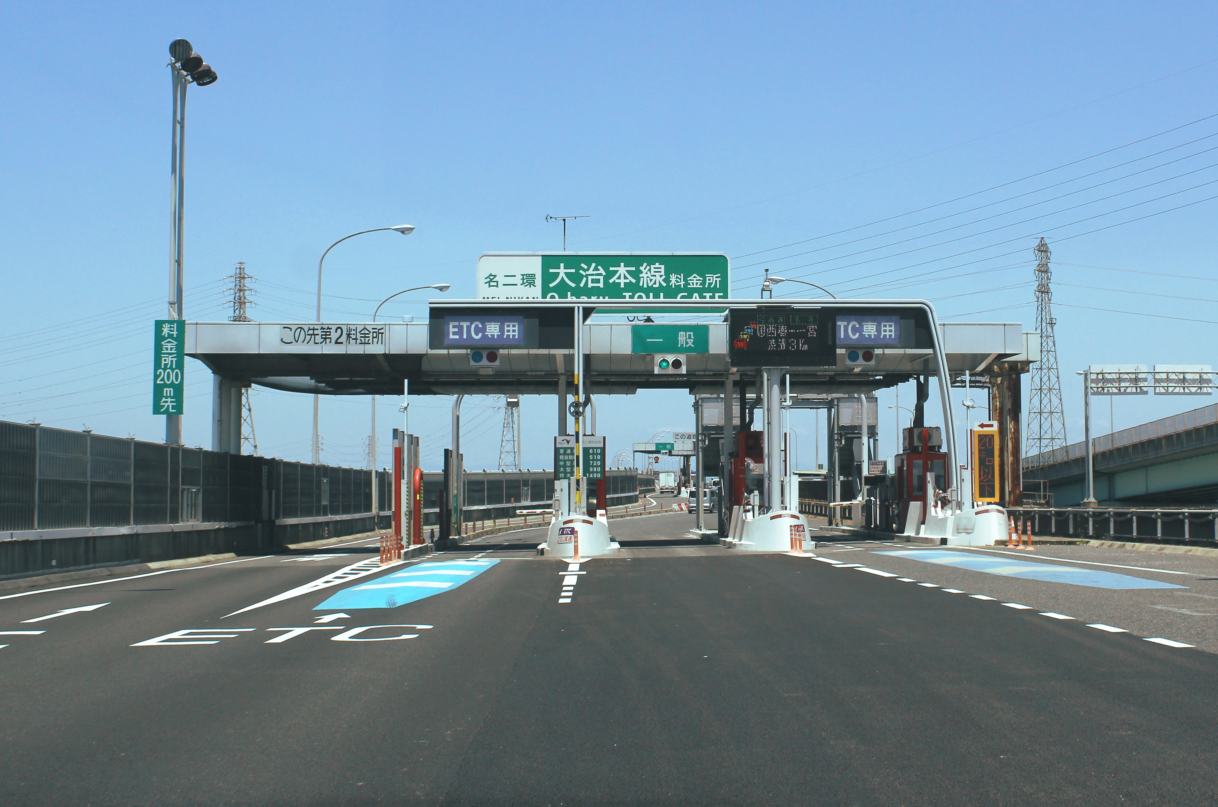 名二環 大治本線料金所